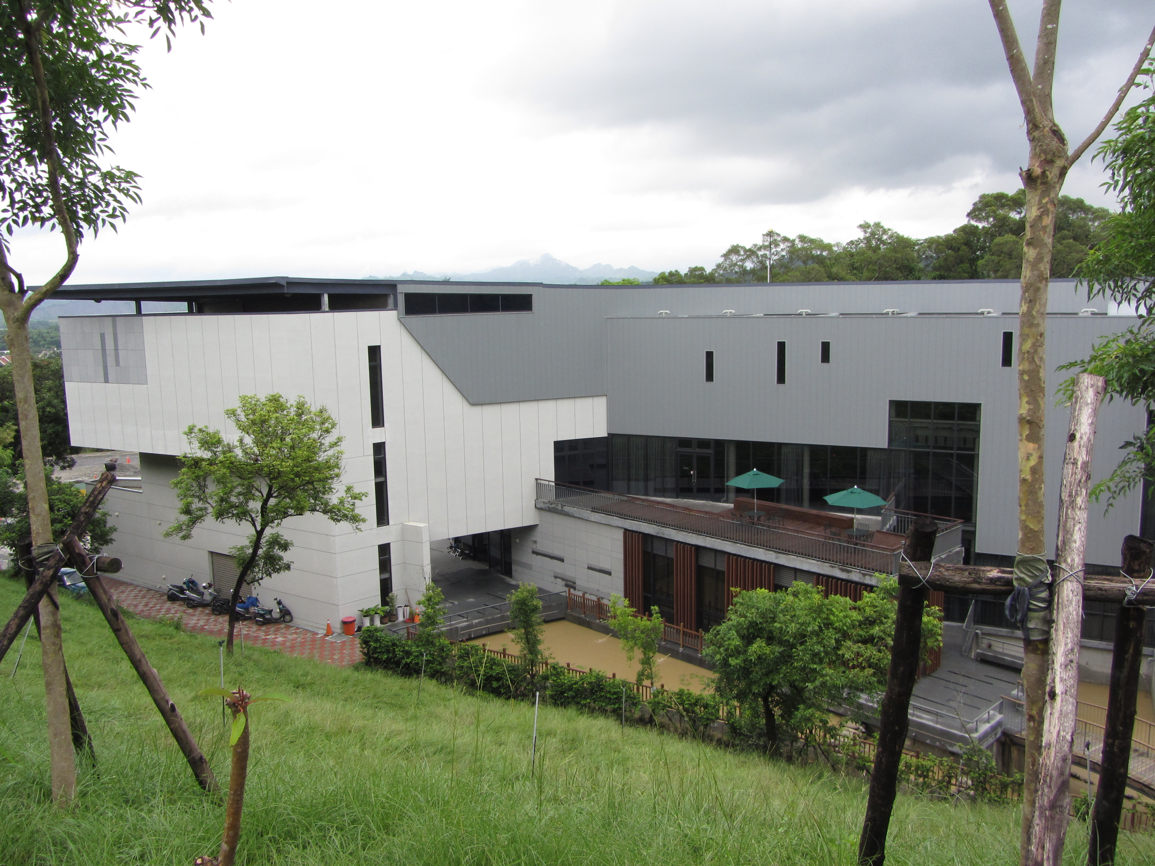 南瀛天文教育園區展示館。